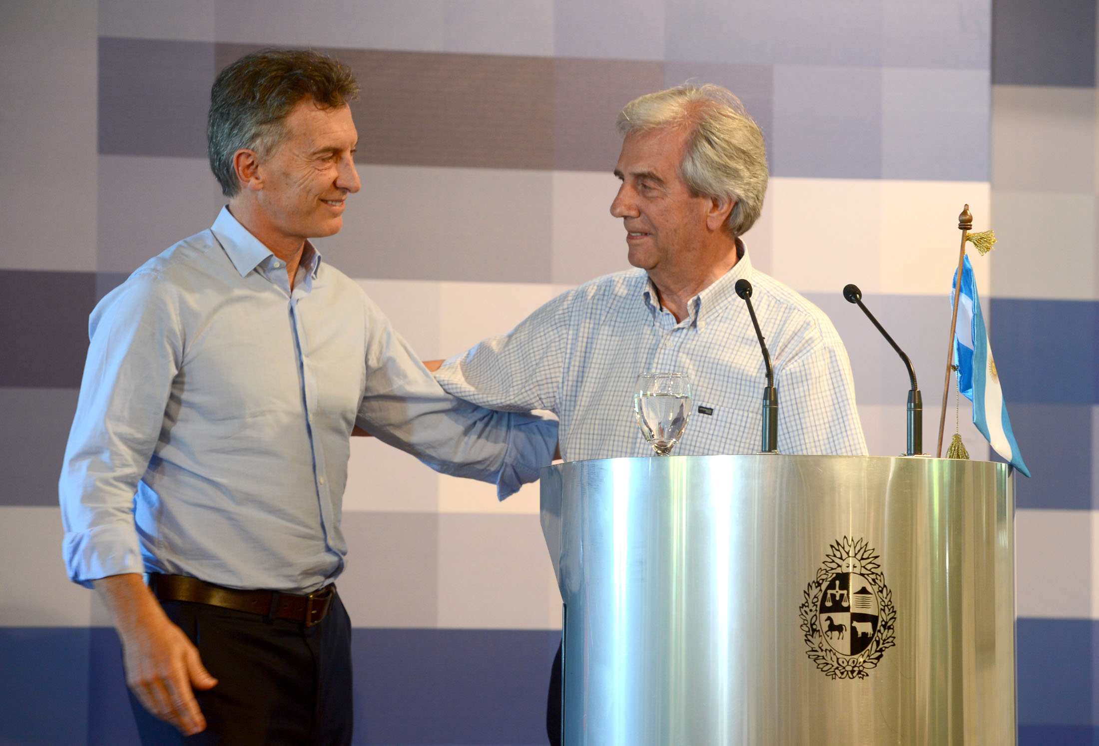 El presidente Mauricio Macri se reunió con su par de la República Oriental del Uruguay Tabaré Vázquez, en la residencia de Parque Anchorena (Colonia, Uruguay), donde ambos mandatarios compartieron un almuerzo el 7 de enero de 2016, y dialogaron sobre las relaciones bilaterales.